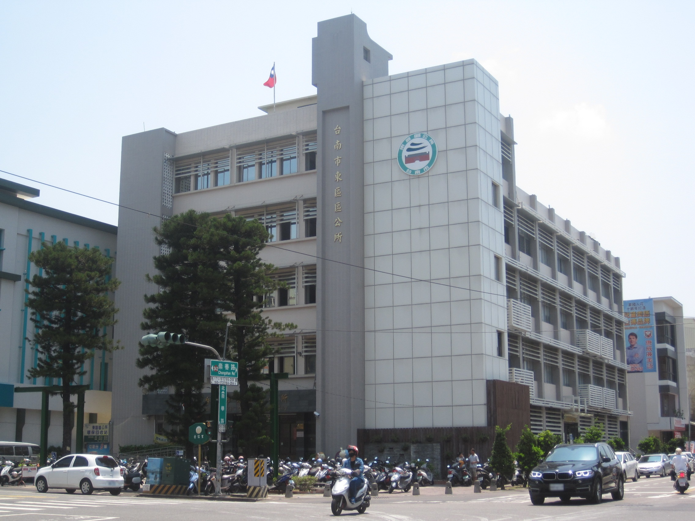 臺南市東區區公所